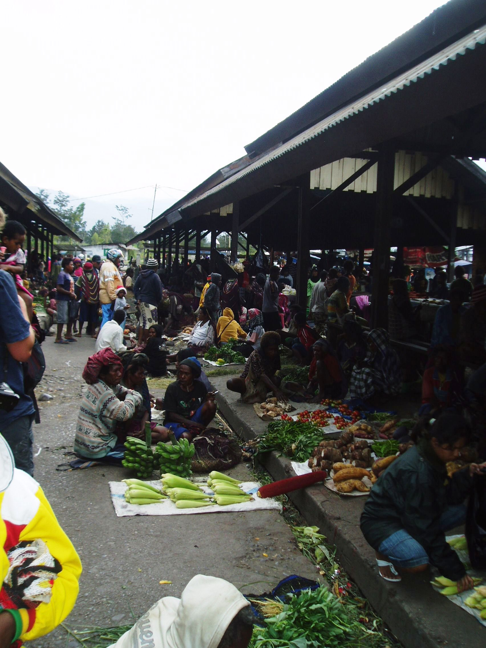 Pasar Wamena (markt) bij Wamena in de Indonesische provincie Papoea